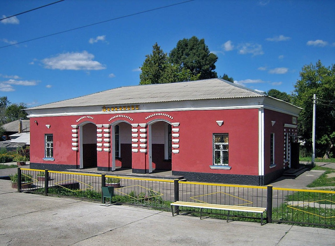 Станция «Дьяконово»